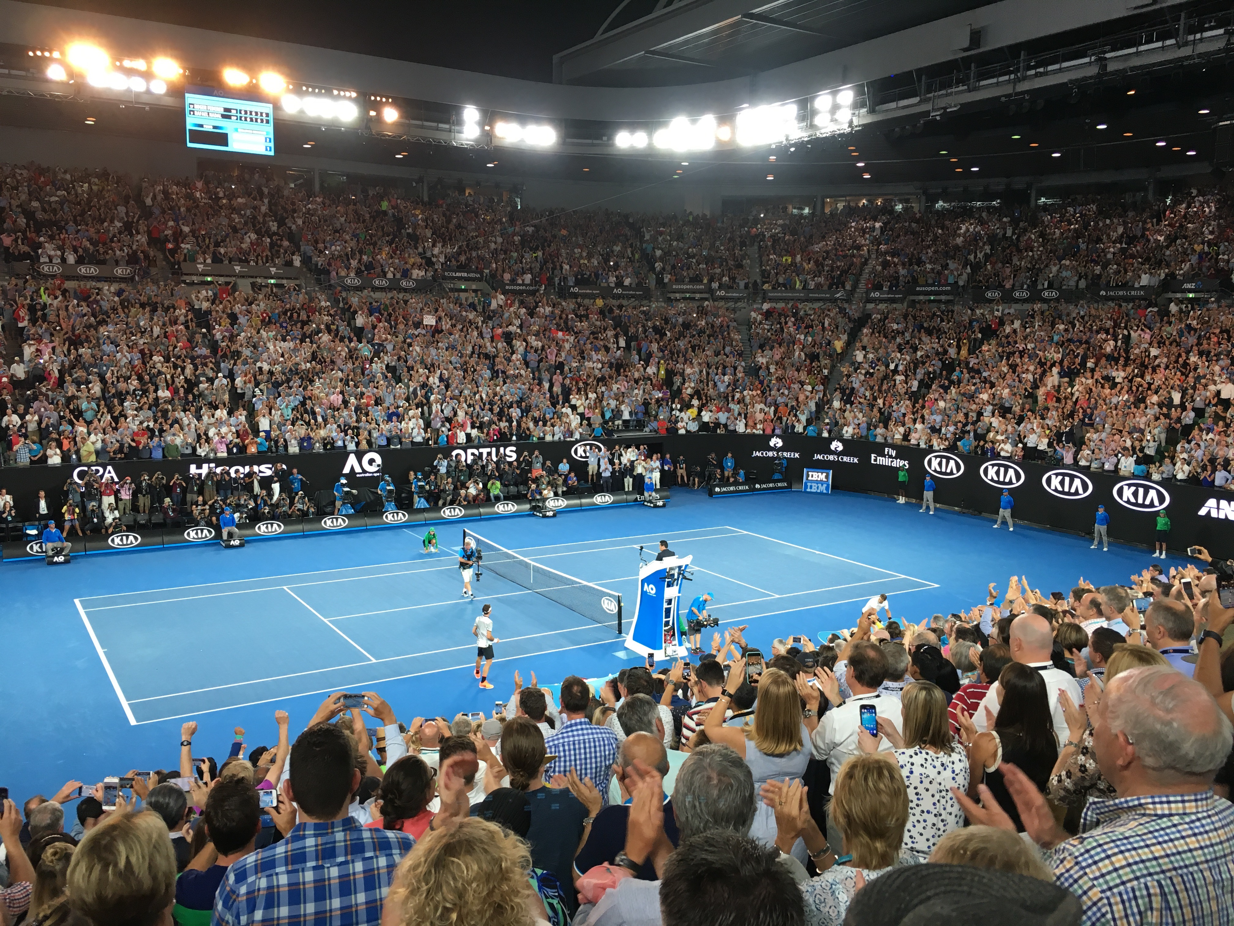 Australian Open 2017 Final - Roger Federer vs Rafa Nadel